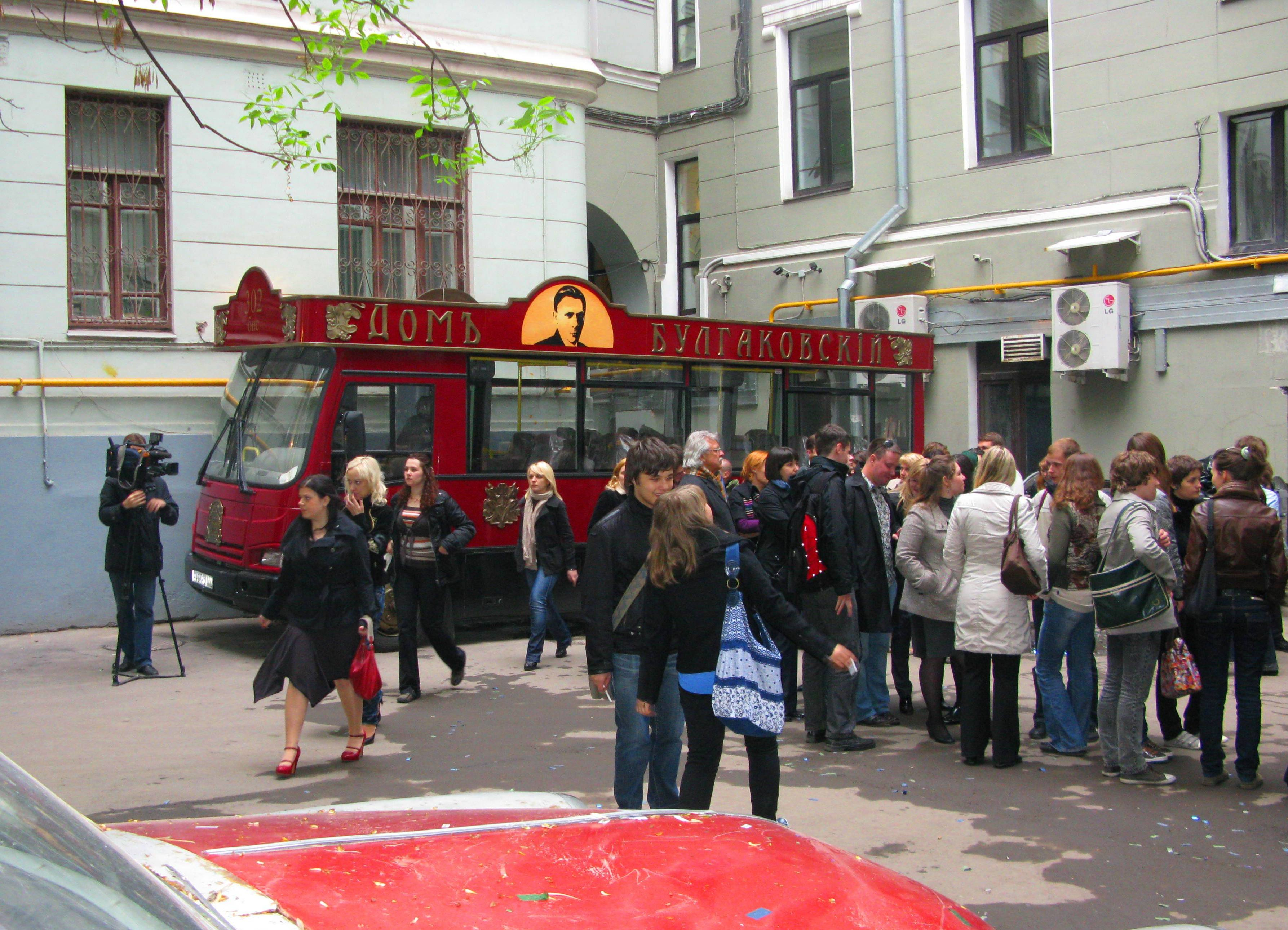 Дом М.БУЛГАКОВА-Ночь в музеях 16-17 мая, м, Маяковская, Москва, Россия.